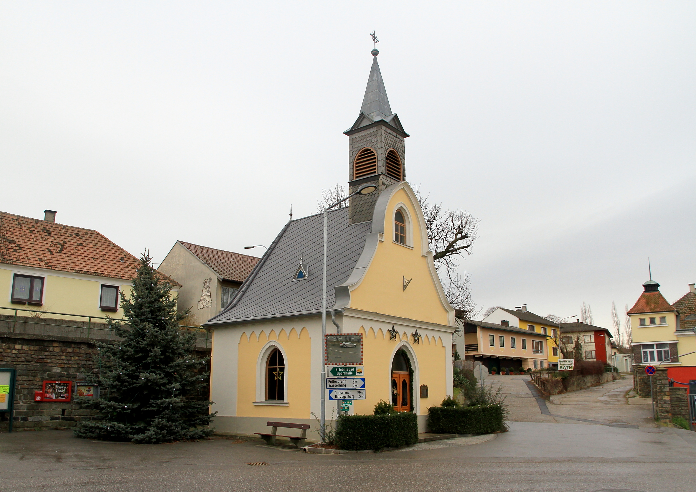 Die Ortskapelle von Ossarn, ein Ortsteil der niederösterreichischen Stadt Herzogenburg.